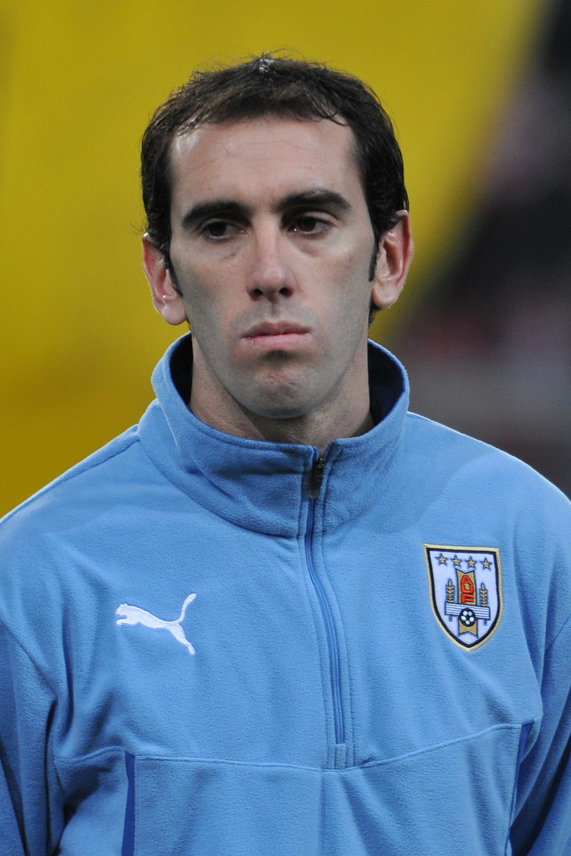 Freundschaftliches Länderspiel Österreich - Uruguay am 5. März 2014 in Klagenfurt: Diego Godín